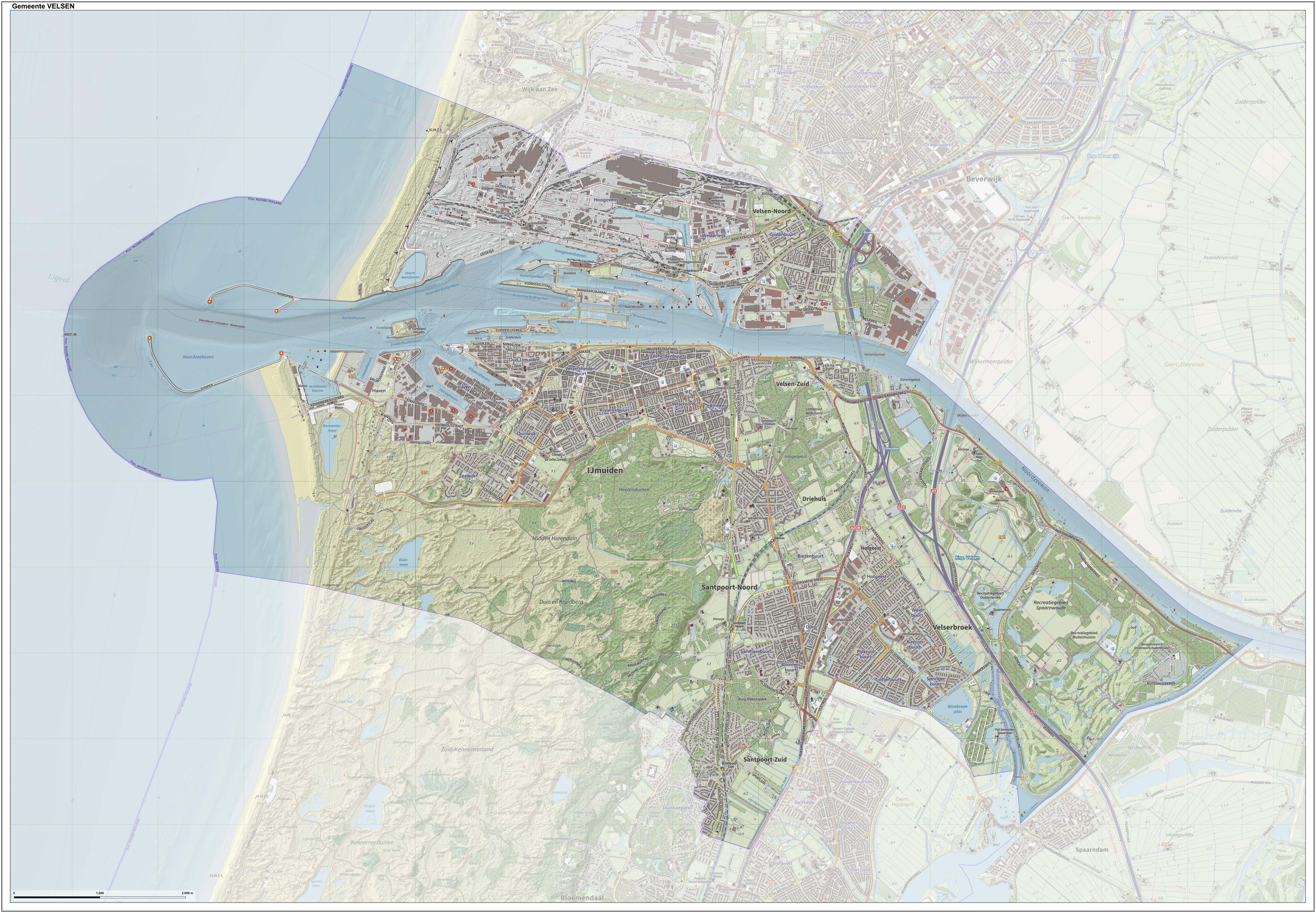 Topografische gemeentekaart. Resolutie: 400 pixels/km. Kaartbeeld samengesteld uit de open geodata van de Top10NL en Top25namen (Kadaster), Creative Commons-BY licentie. Gebouwvlakken uit open geodata BAG extract. Wegen uit de OpenStreetMap, OpenStreetMap community. Reliëfschaduw uit de Actuele Hoogtekaart AHN2. Samenstelling en kleurenschema: Jan-Willem van Aalst, met QGIS. Zie ook de Legenda.